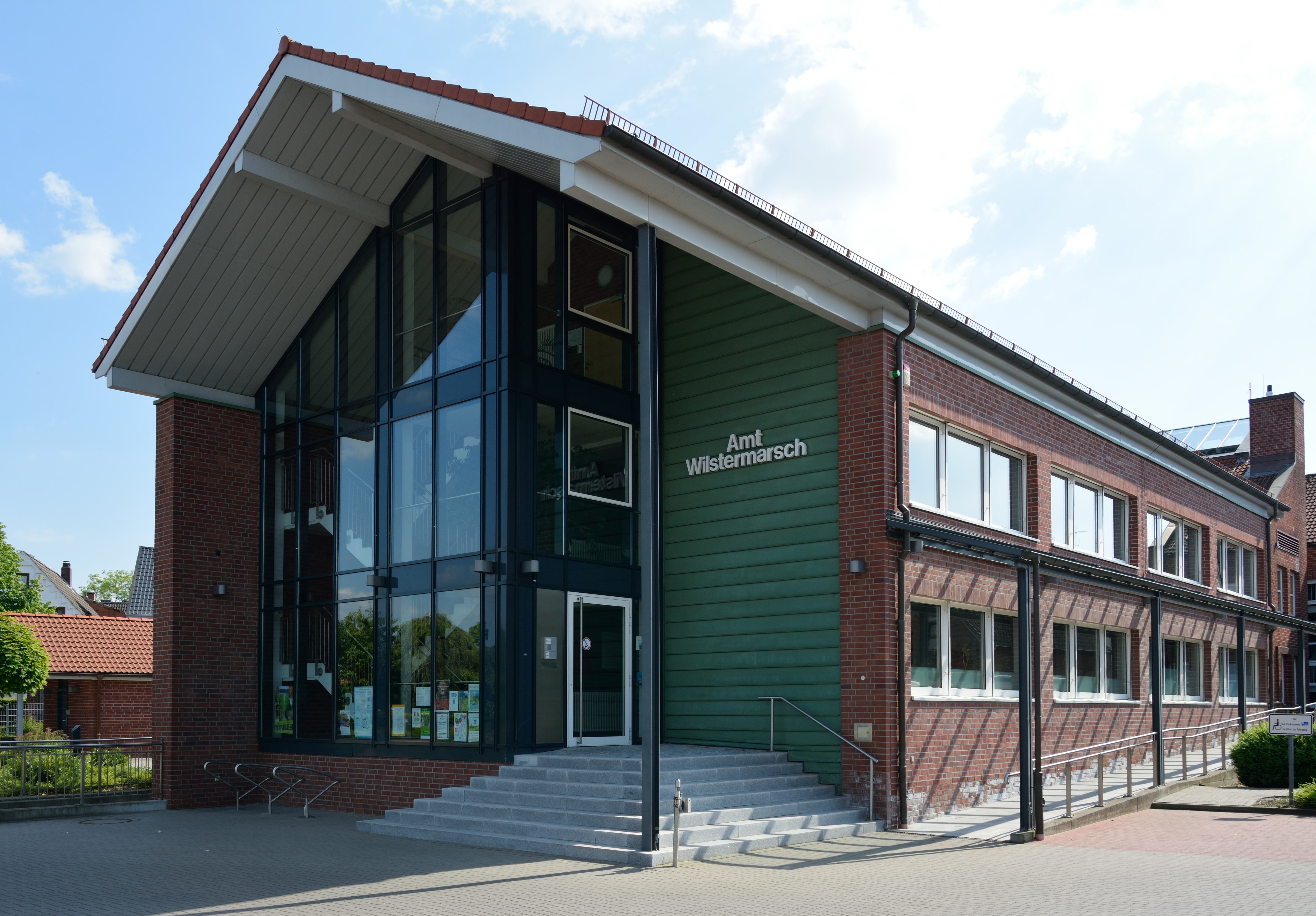 Amt Wilstermarsch